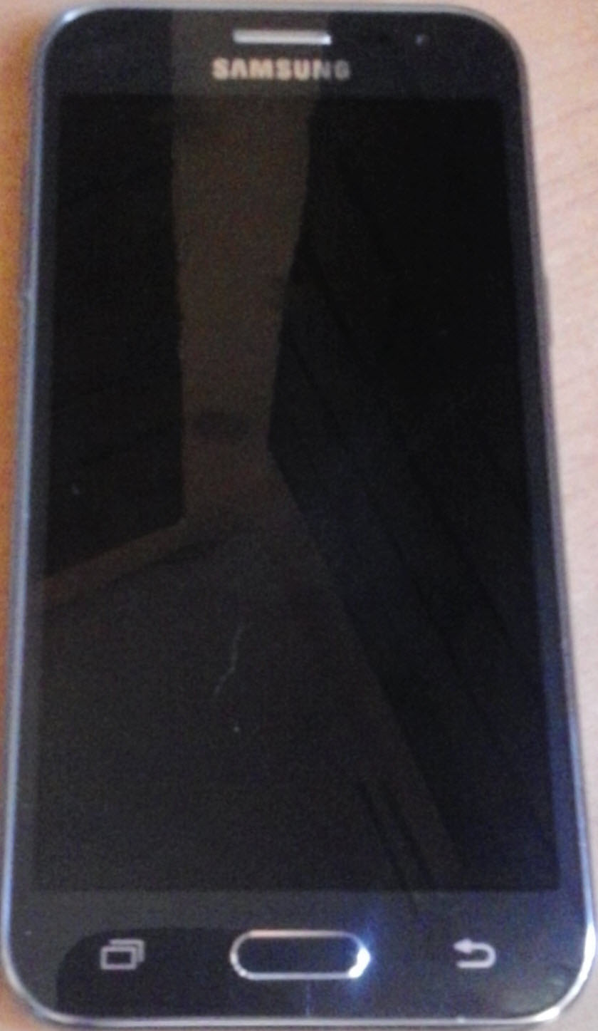 Samsung galaxy J2 2016